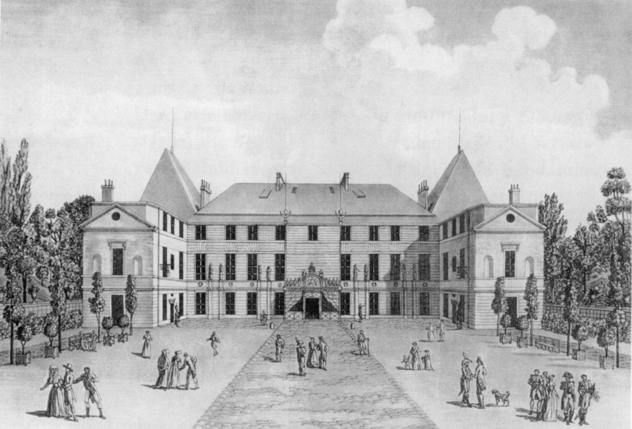 Das Schloss Malmaison bei Rueuil, westlich von Paris auf einer Radierung des 19. Jahrhunderts. Wohnsitz Napoleon Bonapartes und seiner Frau Joséphine de Beauharnais während des Konsulats, 1800–1802 zusammen mit den Tuilerien Regierungssitz. Napoleon verfasste hier unter anderem den ersten Entwurf des Code Civil sowie die sog. Verfassung von Malmaison für die Helvetische Republik